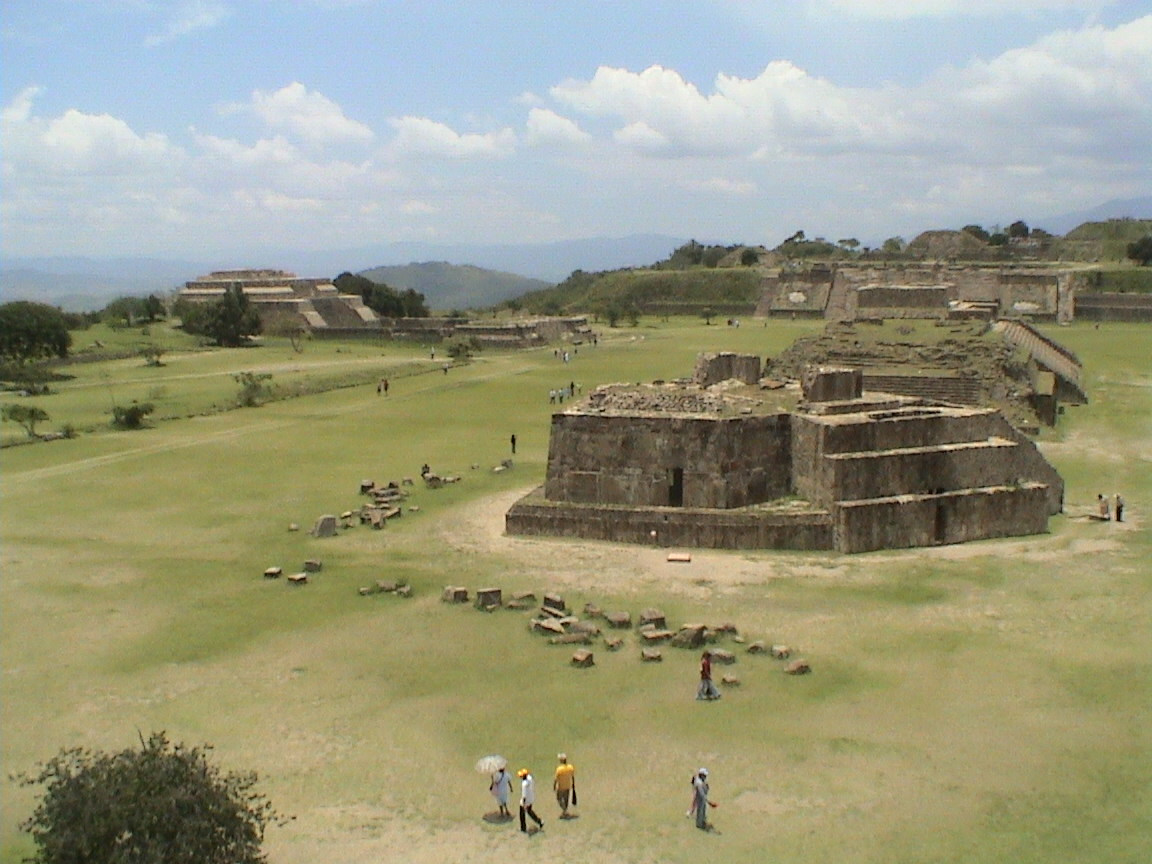 Monte Alban